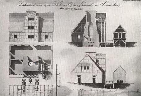 Hochofen zu Sausenberg